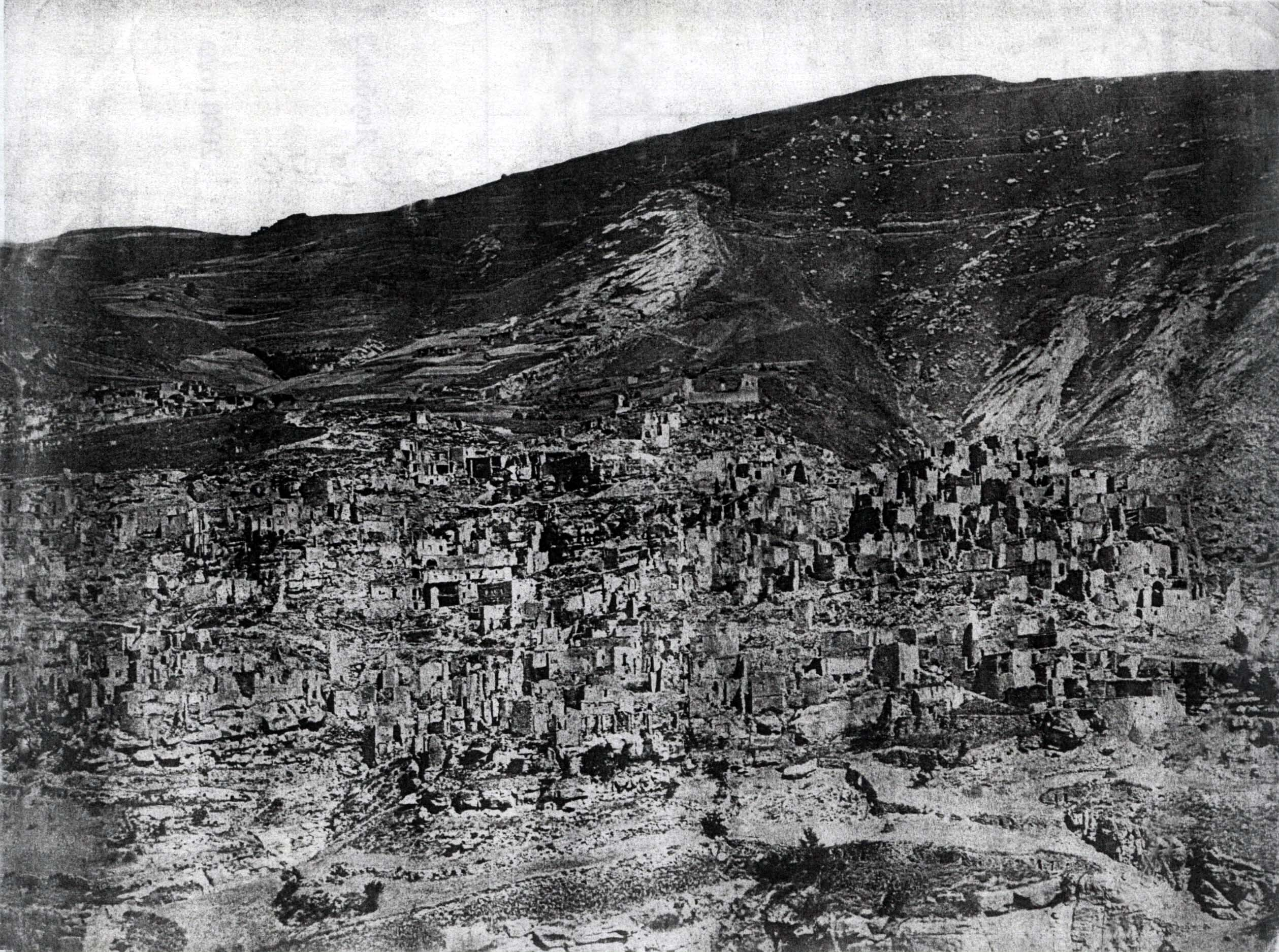 Фотография аула Согратль после сожжения